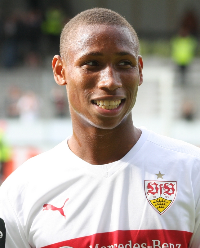 Caniggia Elva nach dem Spiel gegen Bremen II. Bild von